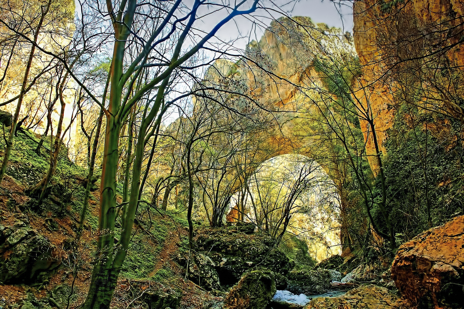 Споменик природе Прераст у кањону Вратне Ово је фотографија заштићеног природног добра у Србији под шифром: СП274This is a a photo of a natural area in Serbia with ID: СП274